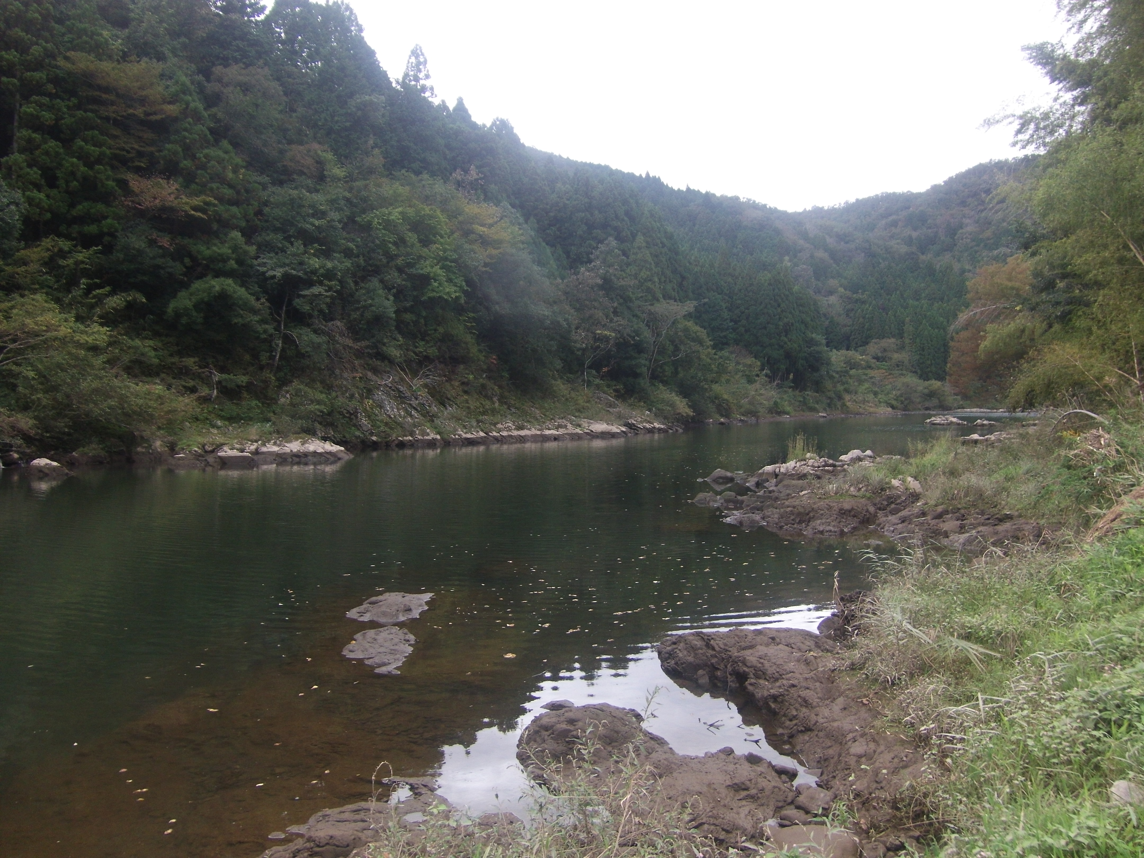 大野ダム下流となる京丹波町和知近くを流れる由良川